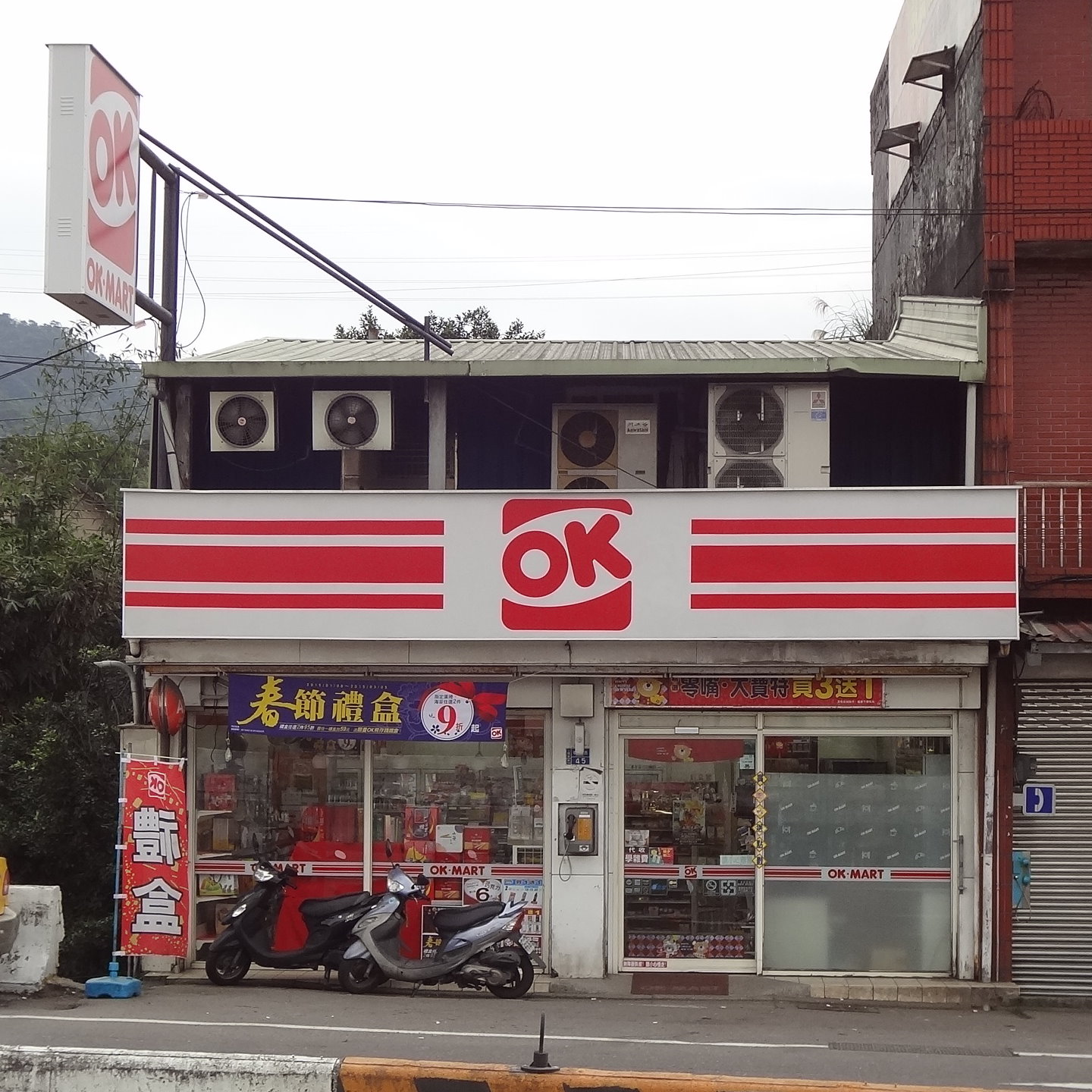 中文（台灣）: OK超商基隆長安店，地址：基隆市七堵區明德三路45號。